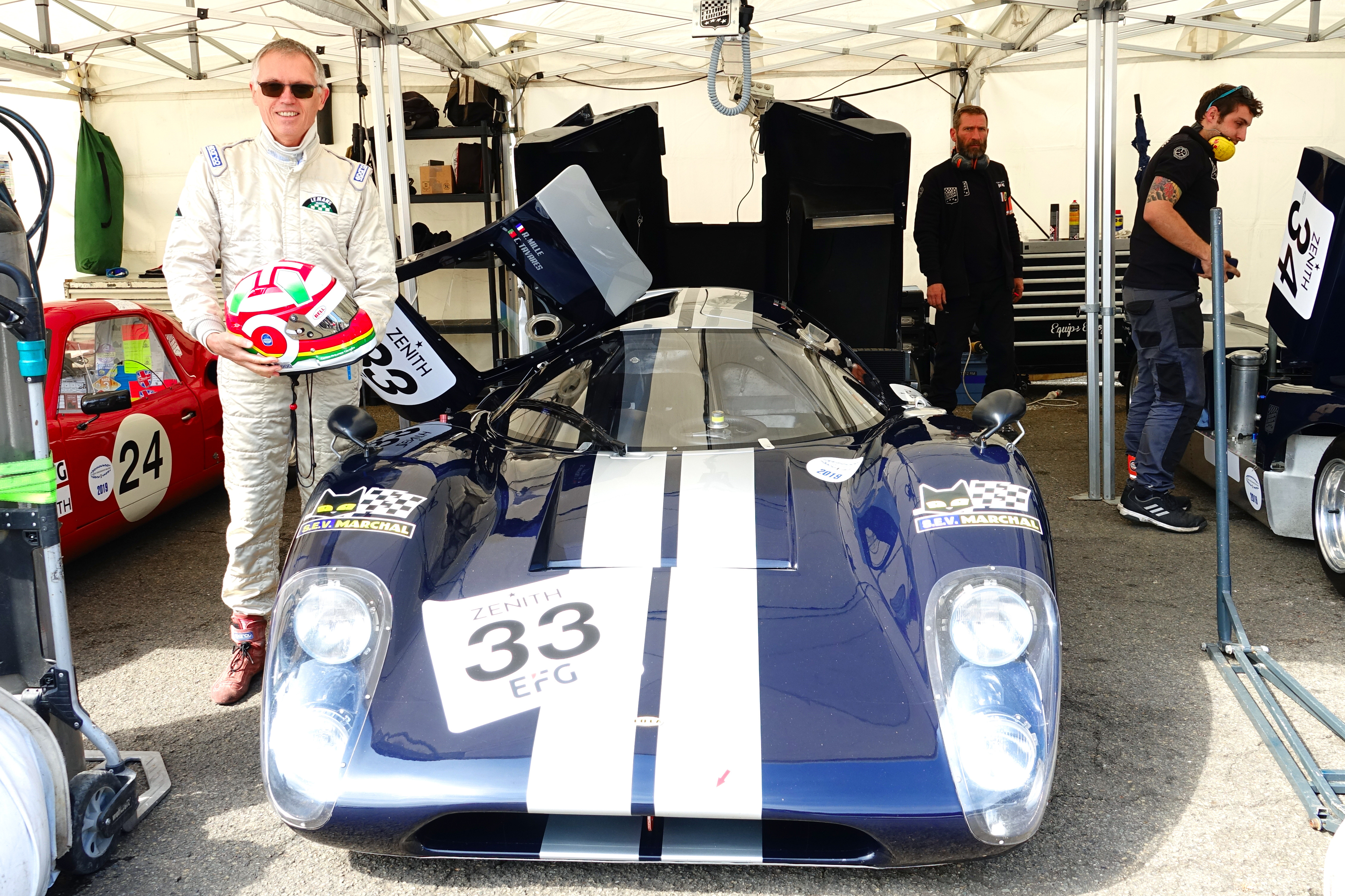 Carlos Tavares - Spa Classic 2019 - Lola T70